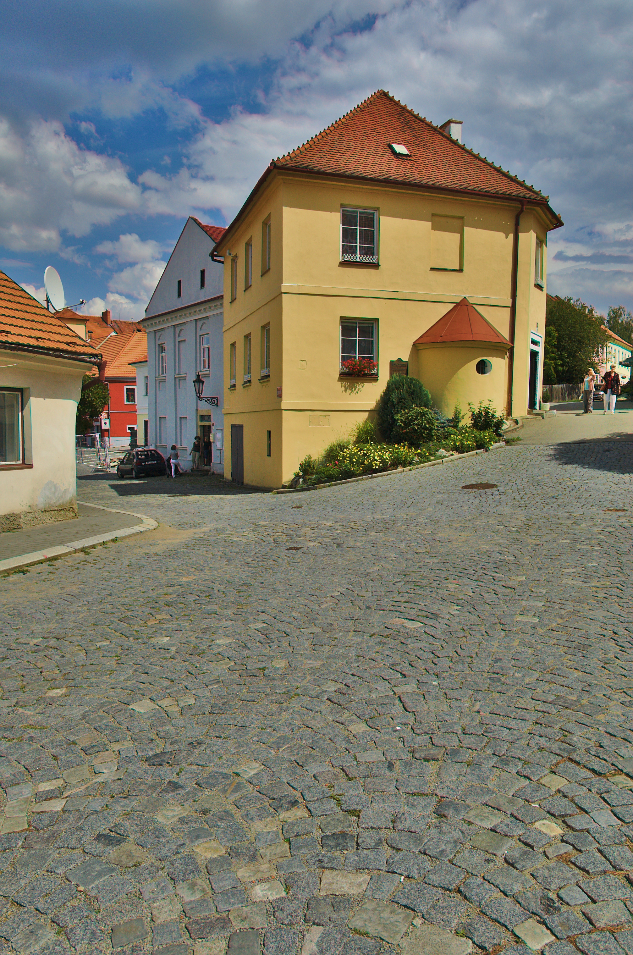 Židovský dům, čp. 385, Plačkova, Boskovice, okres Blansko